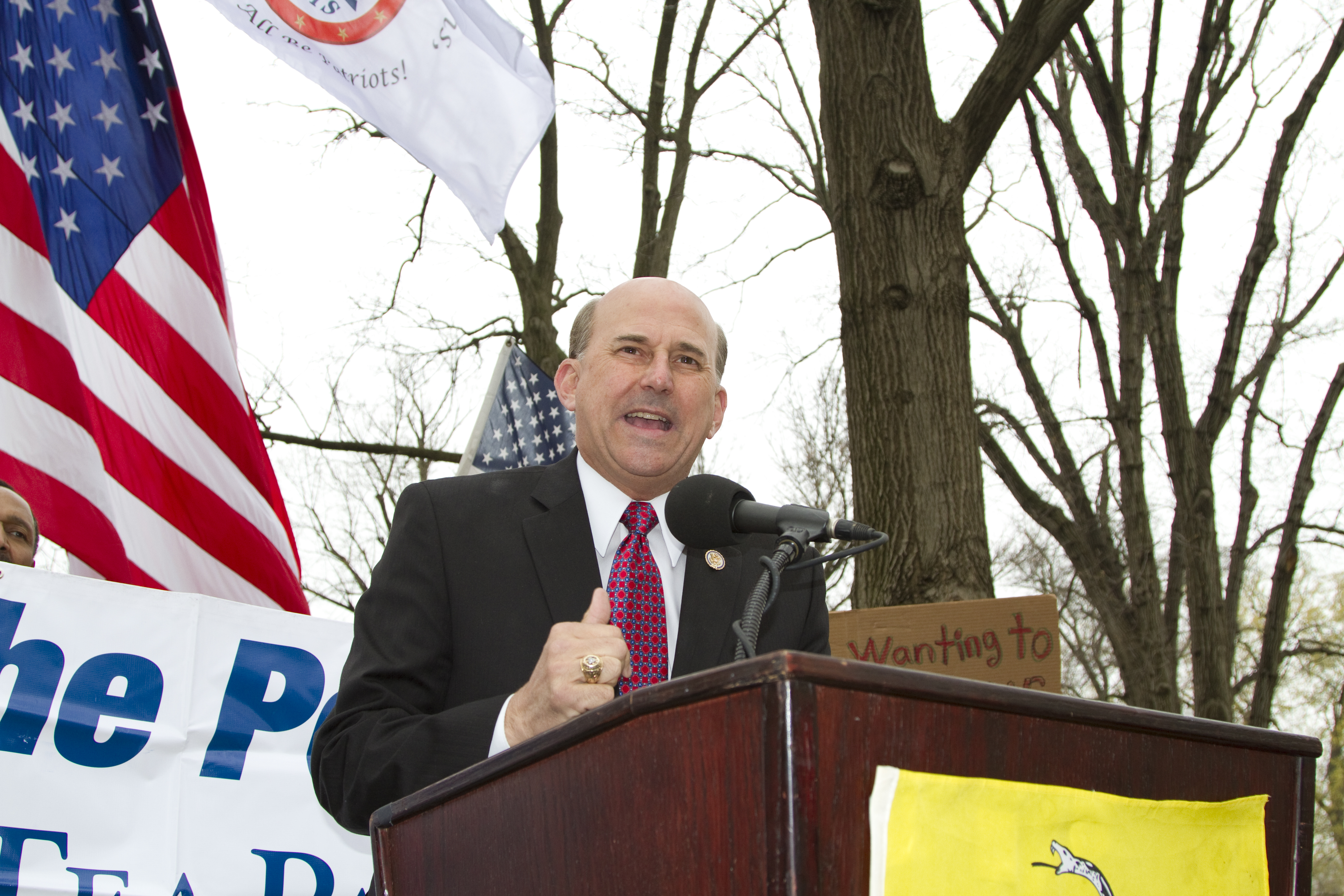 Rep. Louie Gohmert speaking.